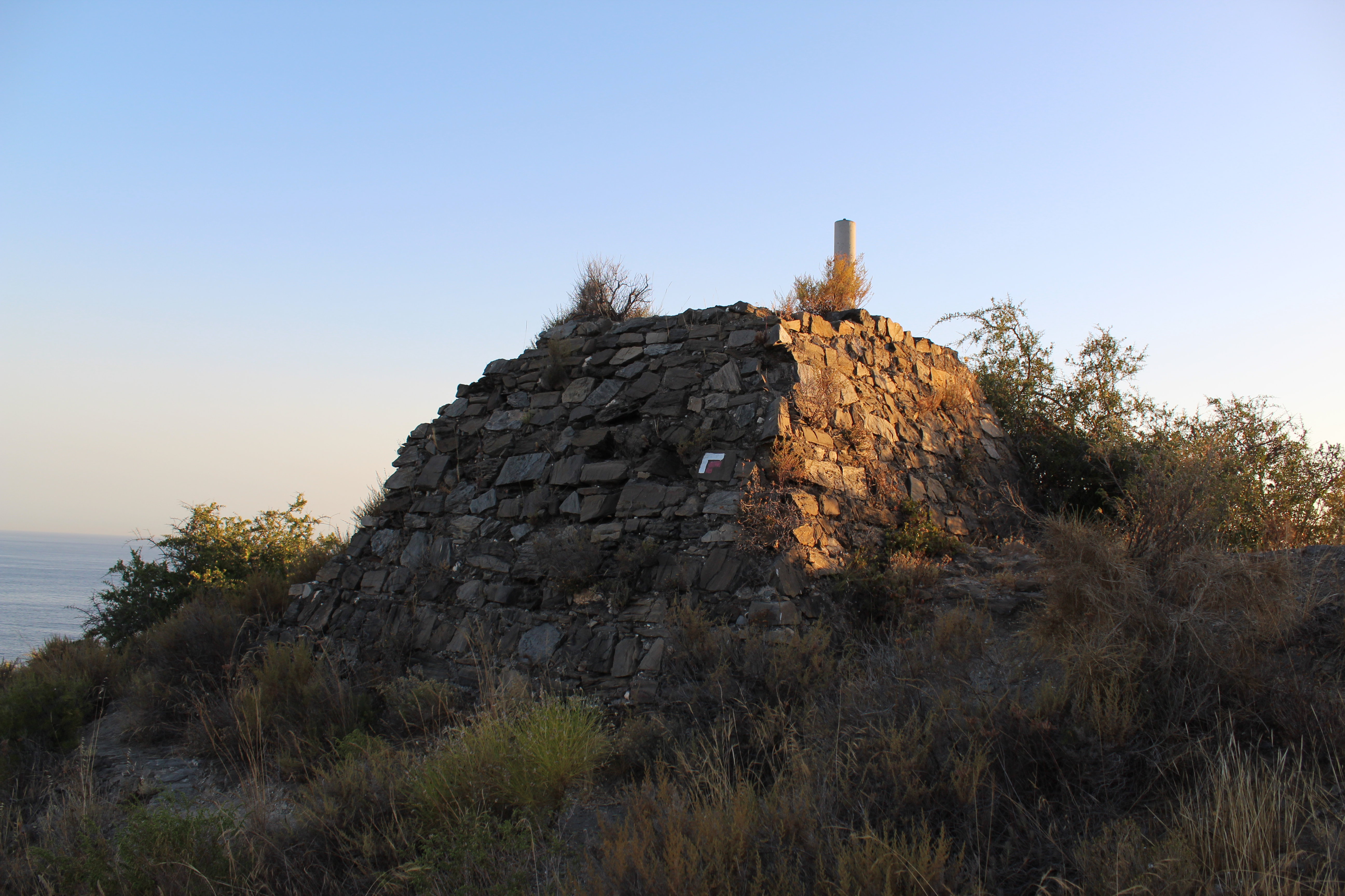 Vista cercana de la Torre de Enmedio.